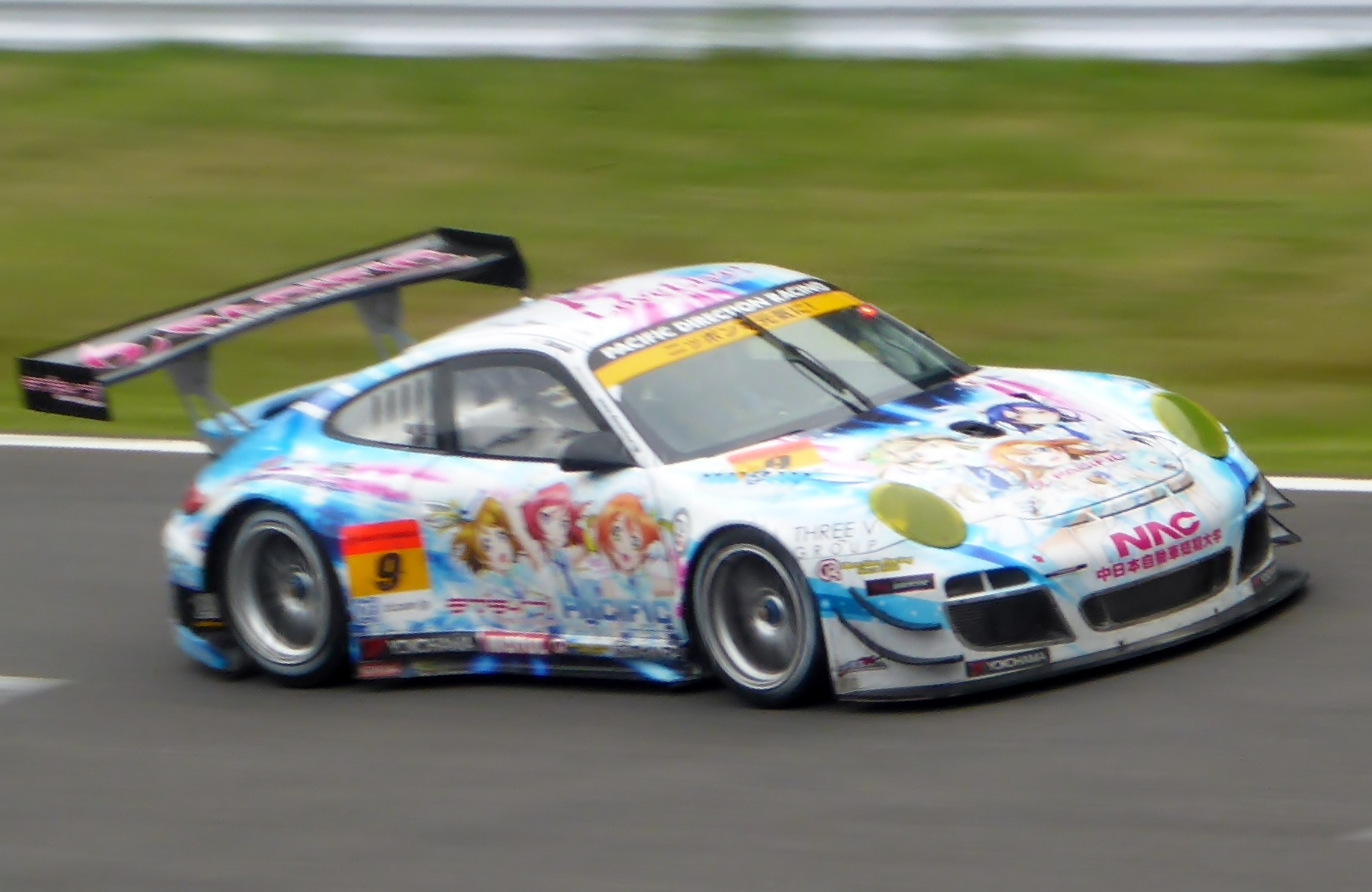 2014年鈴鹿テストにおいて9号車国立音ノ木坂学院NACポルシェwith DRを撮影。